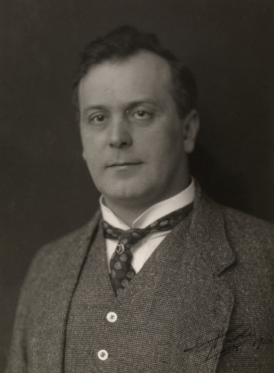 Sigurd Asmundsen (1916), portrett, mann, skuespiller, brystbilde.